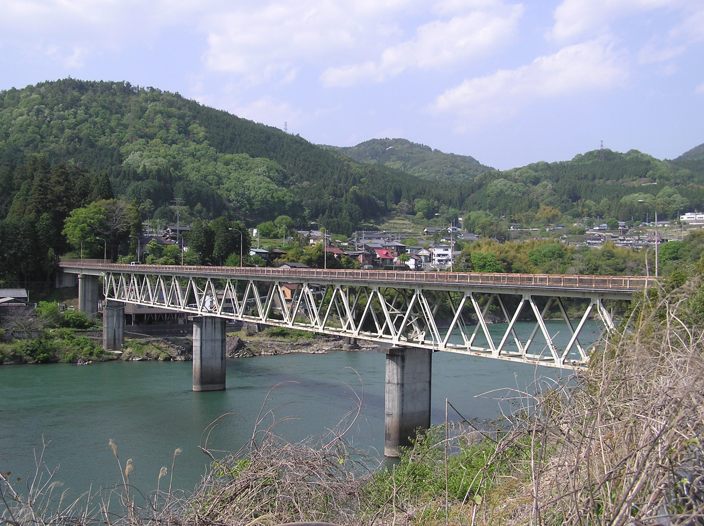 八百津大橋（岐阜県加茂郡八百津町）